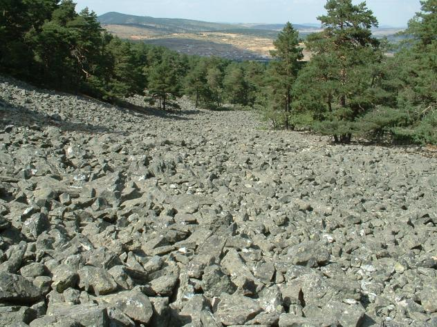 Rio de piedra bajo el santuario en Orihuela del Tremedal